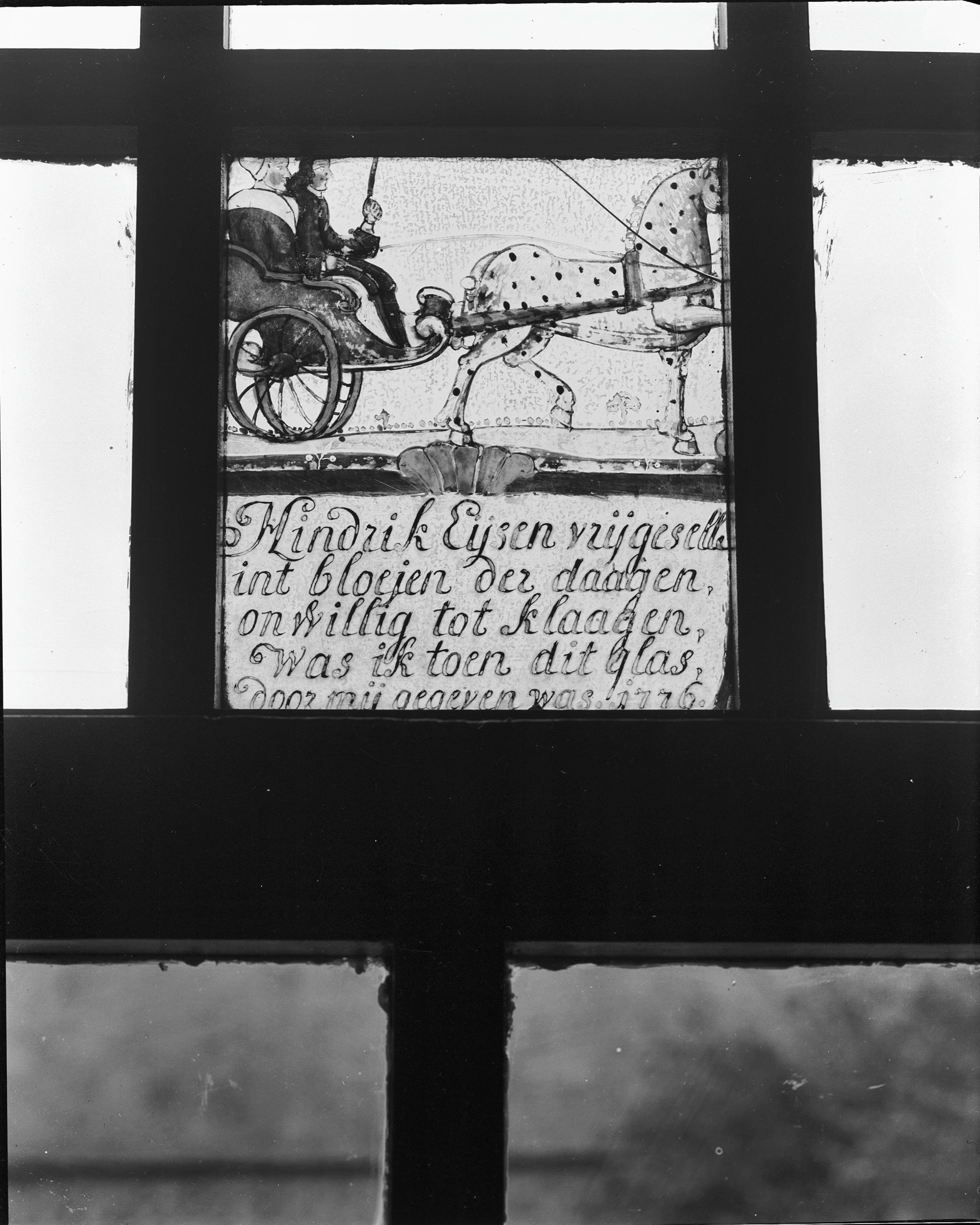 Fensterbierscheibe